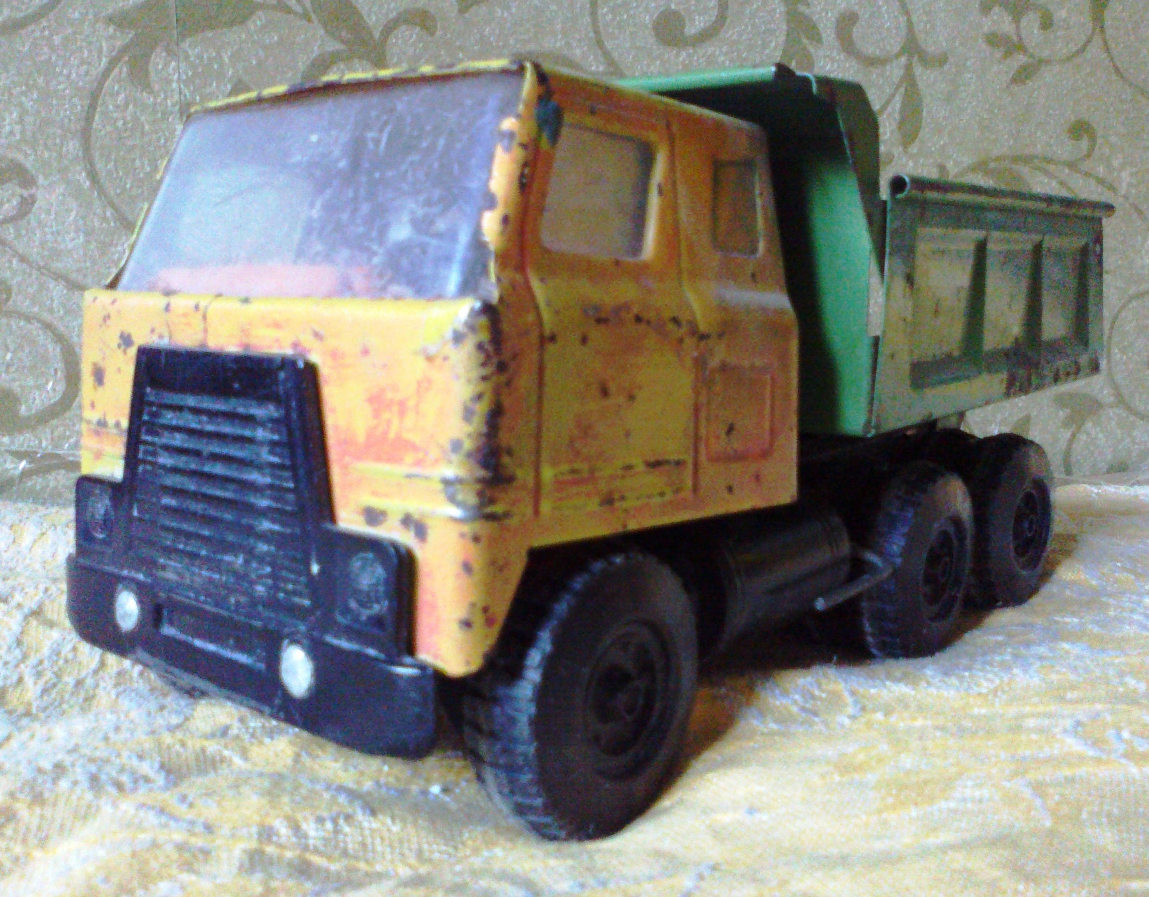 Самосвал. Игрушка времён СССР.